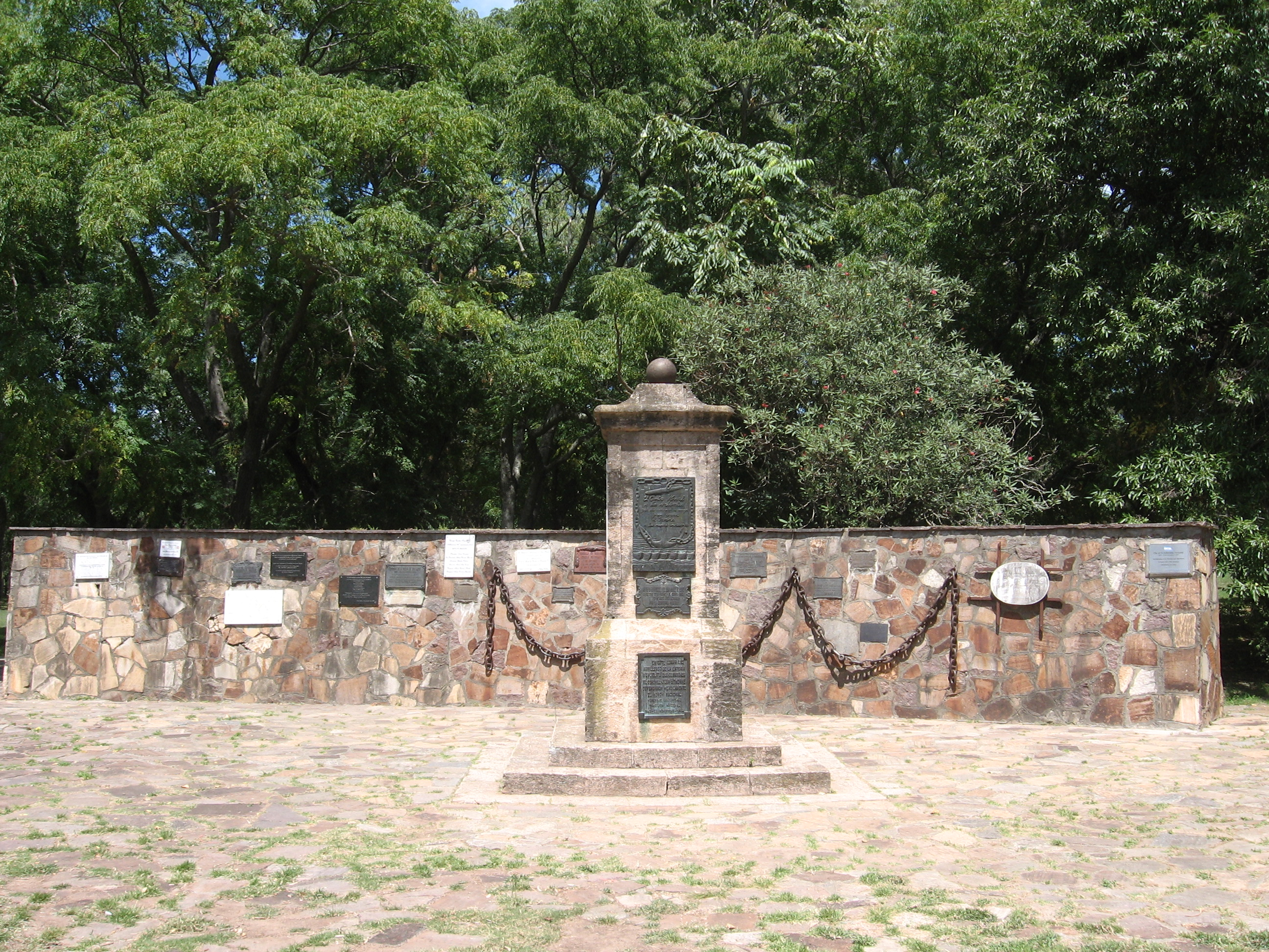 Numerosas placas conmemorativas a los héroes de Vuelta de Obligado, en el sitio en donde se celebró la batalla